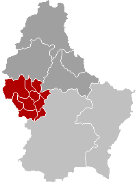 De Kanton Réiden zu Lëtzebuerg.